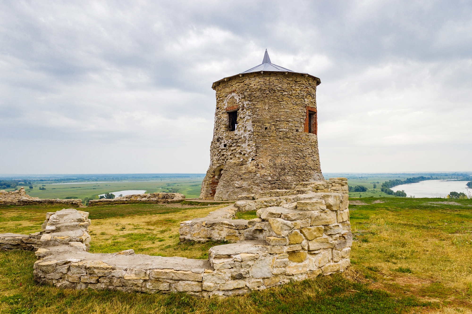 Городище "Чертово": 1 км юго-западнее города, берег р.Тойма, Елабуга, Татарстан